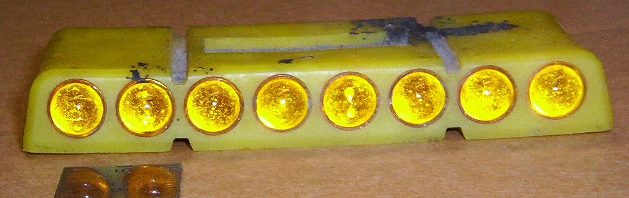 Katzenauge (cat eye) in einem Straßenmarkierungselement